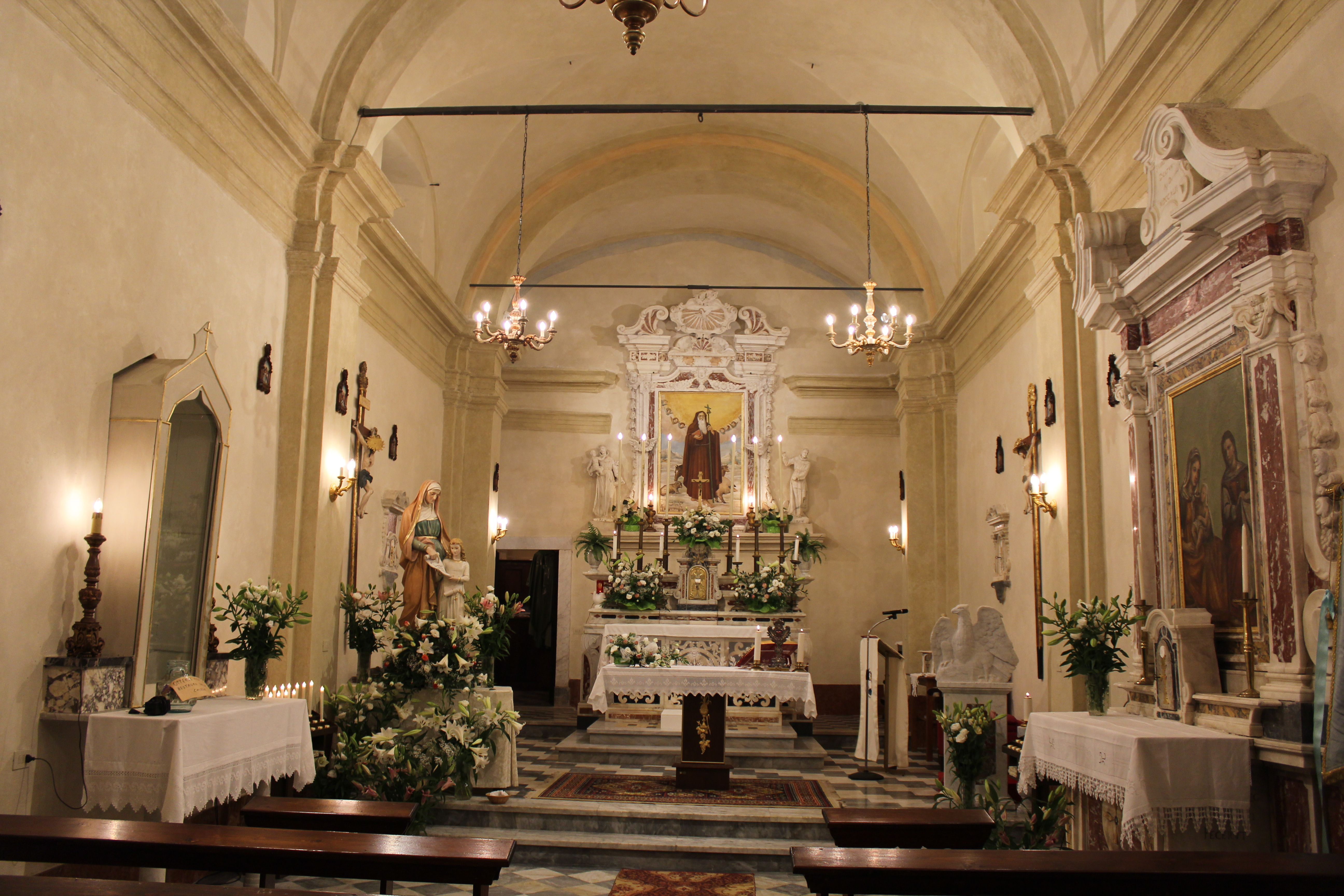 interni